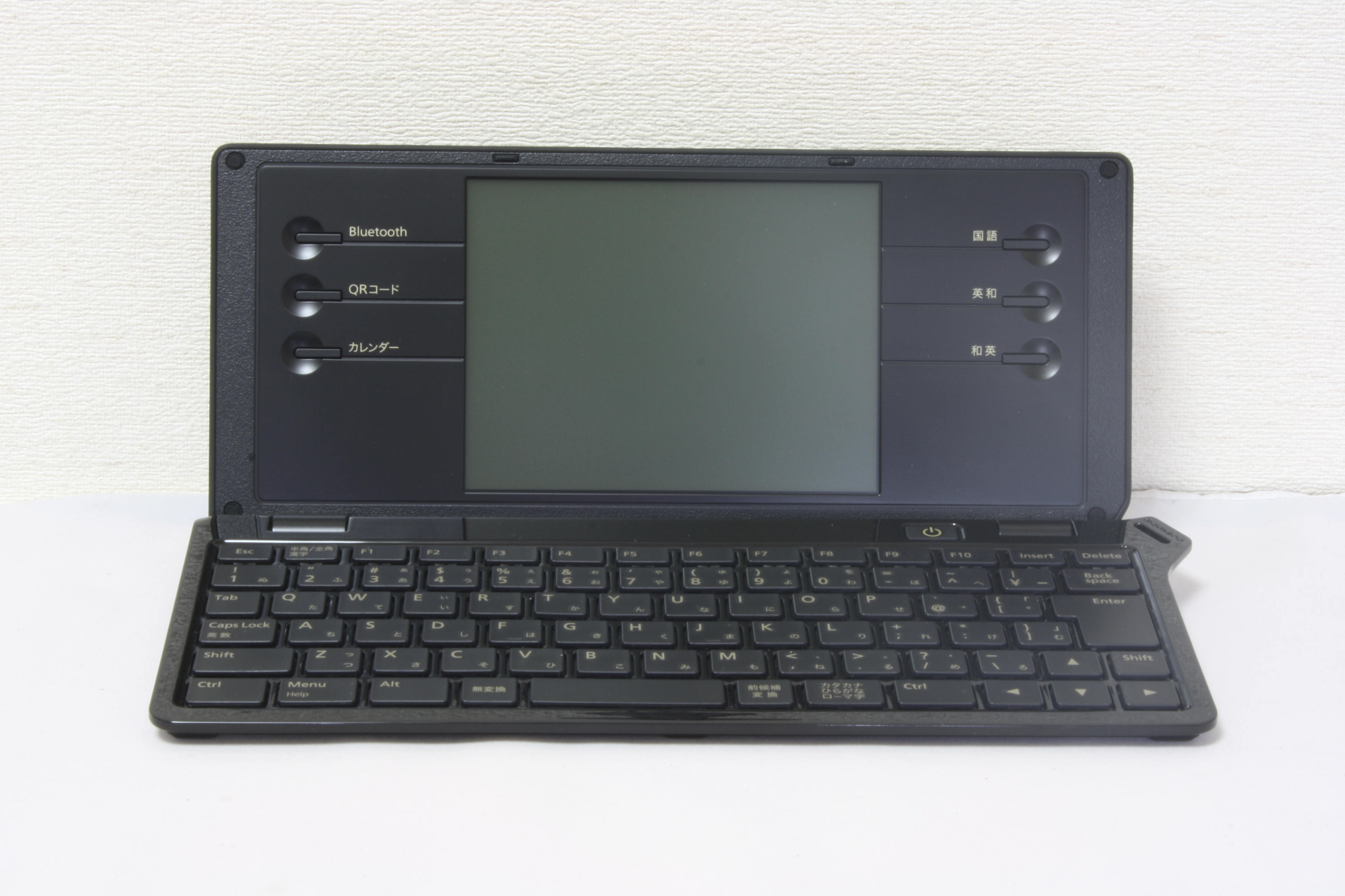 KINGJIM ポメラ DM-100